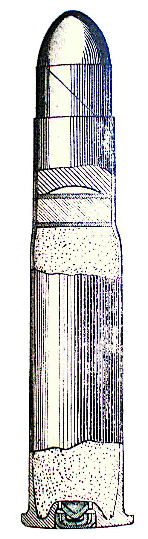 Φυσίγγιο τυφεκίου Γκρα